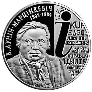 Беларуская (тарашкевіца): Памятная манэта «В. Дунін-Марцінкевіч. 200 год»